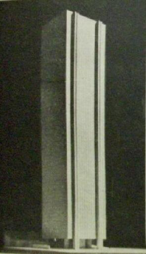 Maqueta del proyecto ganador para el Edificio Peugeot en Buenos Aires. Arquitectos: Aflalo-Croce-Gasperini. No construido.